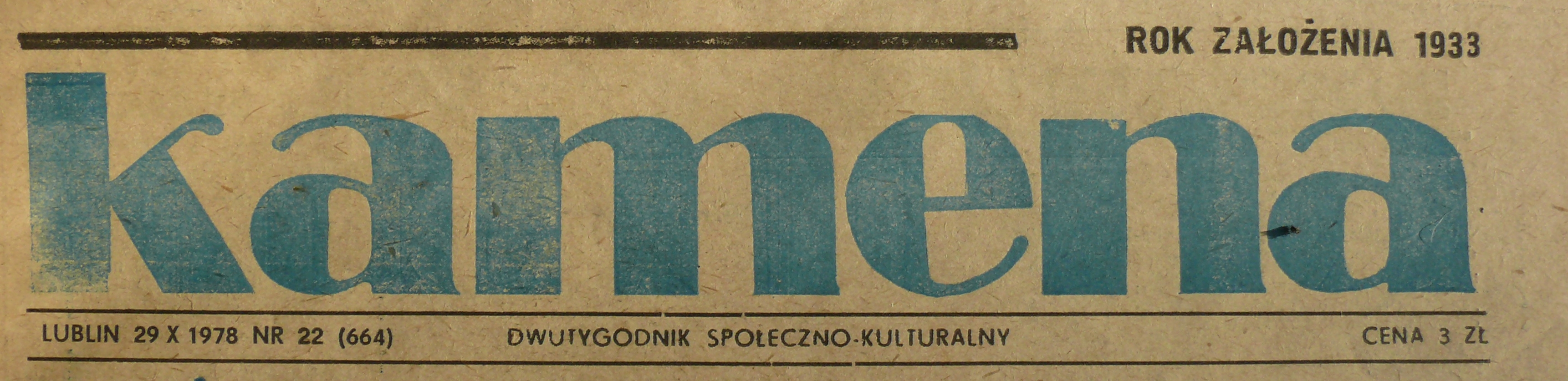 Nagłówek dwutygodnika literackiego "Kamena", wersja grafiki z 1978 r.